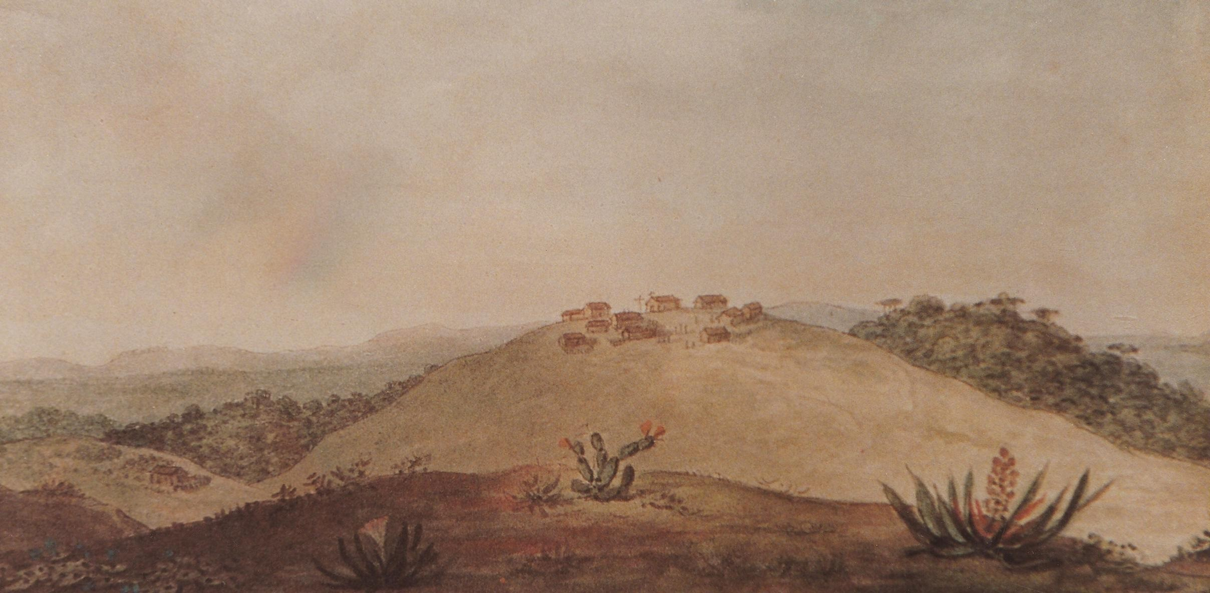 Foto do quadro de Jean Baptiste Debret de 1790, quando de sua viagem pelo sul do Brasil. Retrata o povoado que hoje é a cidade de Ponta Grossa, no Paraná.Ponta Grossa 1827 - Aquarela pintada por Jean Baptiste Debret em 1827, é a primeira imagem registrada a respeito de Ponta Grossa (original source description)